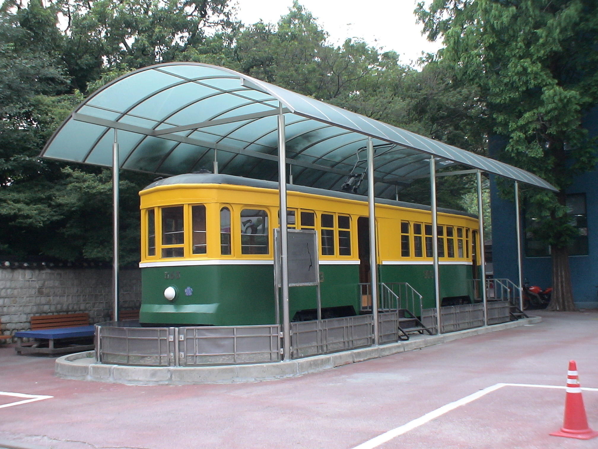 ソウル市電363号車。京城電気→韓国電力→ソウル特別市。日本車輌製造製。復元され、大韓民国ソウルの鍾路区にある国立科学館前庭で保存されている姿。